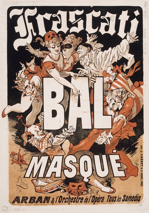 Affiche pour les bals masqués donnés salle Frascati rue Vivienne à Paris sous la direction d'Arban aux commandes de l'orchestre de l'Opéra.